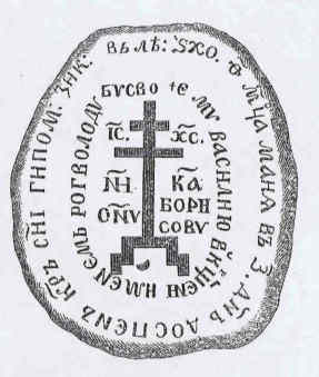 Рисунок Рогволодова камня снятый Тышкевичем К.П. в 1847г. и опубликованный в книге "Труды Первого археологического съезда в Москве 1869г." — М., 1871 Т. 1.